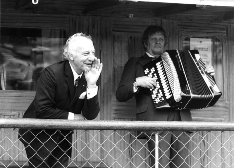 Vom 15. bis 18. Juni 1976 hielt sich Bundespräsident Walter Scheel zu einem offiziellen Besuch in Finnland auf. Neben seiner Frau wurde er von Bundesaußenminister Hans-Dietrich Genscher begleitet. Es handelte sich hier um den ersten Staatsbesuch eines Bundespräsidenten in Finnland. Während seines Aufenthaltes in der finnischen Hauptstadt führte Bundespräsident Walter Scheel zwei ausgedehnte Gespräche mit Präsident Kekkonen. Bundesaußenminister Genscher traf seinerseits mit seinem finnischen Kollegen, Kalevi Sorsa, sowie mit Ministerpräsident Martti Miettunen, zusammen. Im Mittelpunkt der Gespräche standen kulturelle Fragen, die Ost-West-Beziehungen sowie das Defizit Finnlands im Handel mit der Bundesrepublik. Bundespräsident Walter Scheel wähend einer Kreuzfahrt auf dem Kallavesi-See bei Kuopio